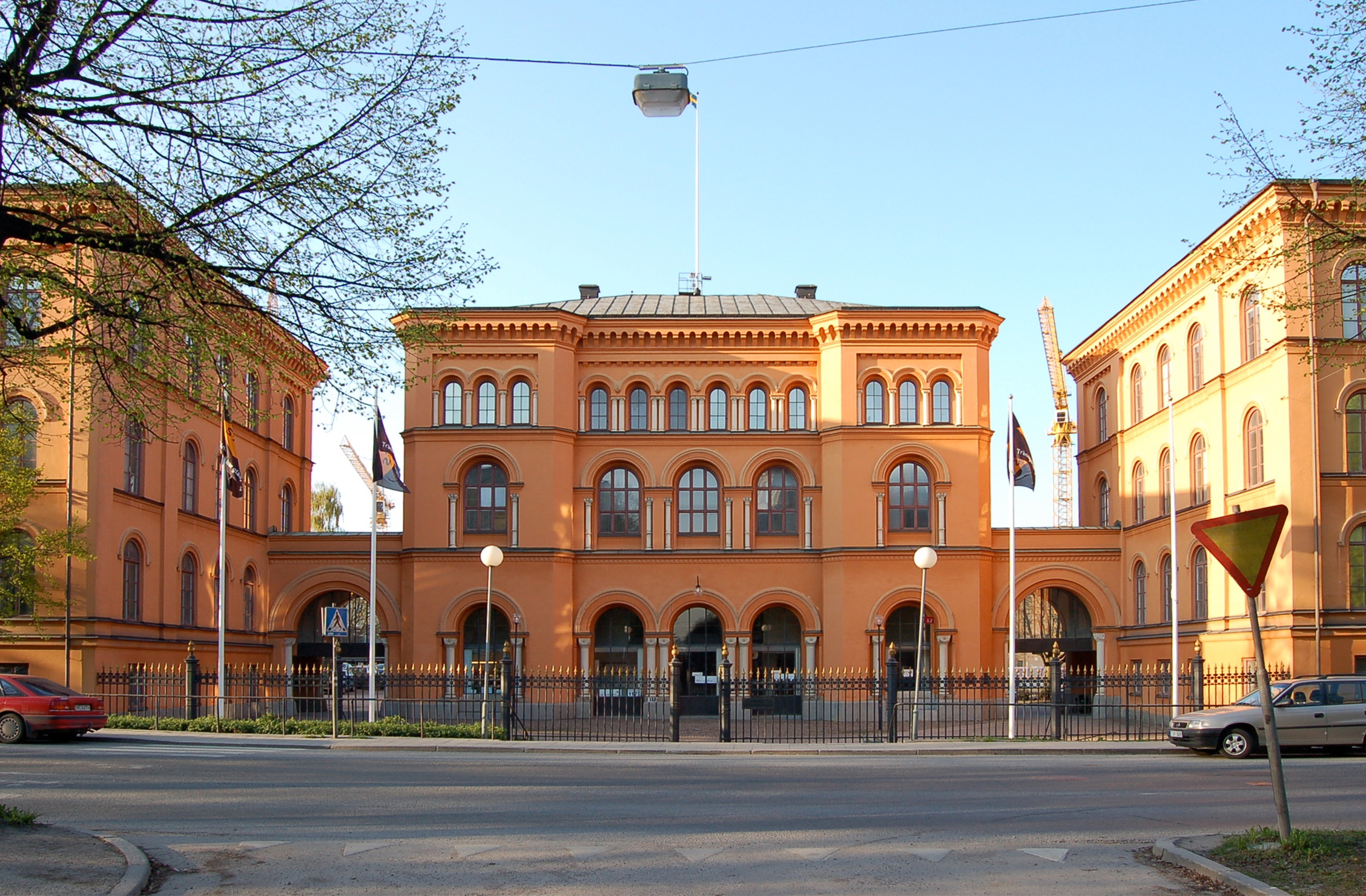 Försvarshögskolans gamla lokaler på Valhallavägen på Ladugårdsgärdet i Stockholm.